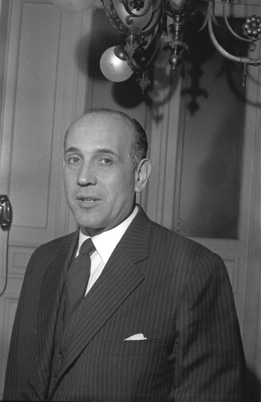 Héctor Alejandro Correa Letelier, político chileno.